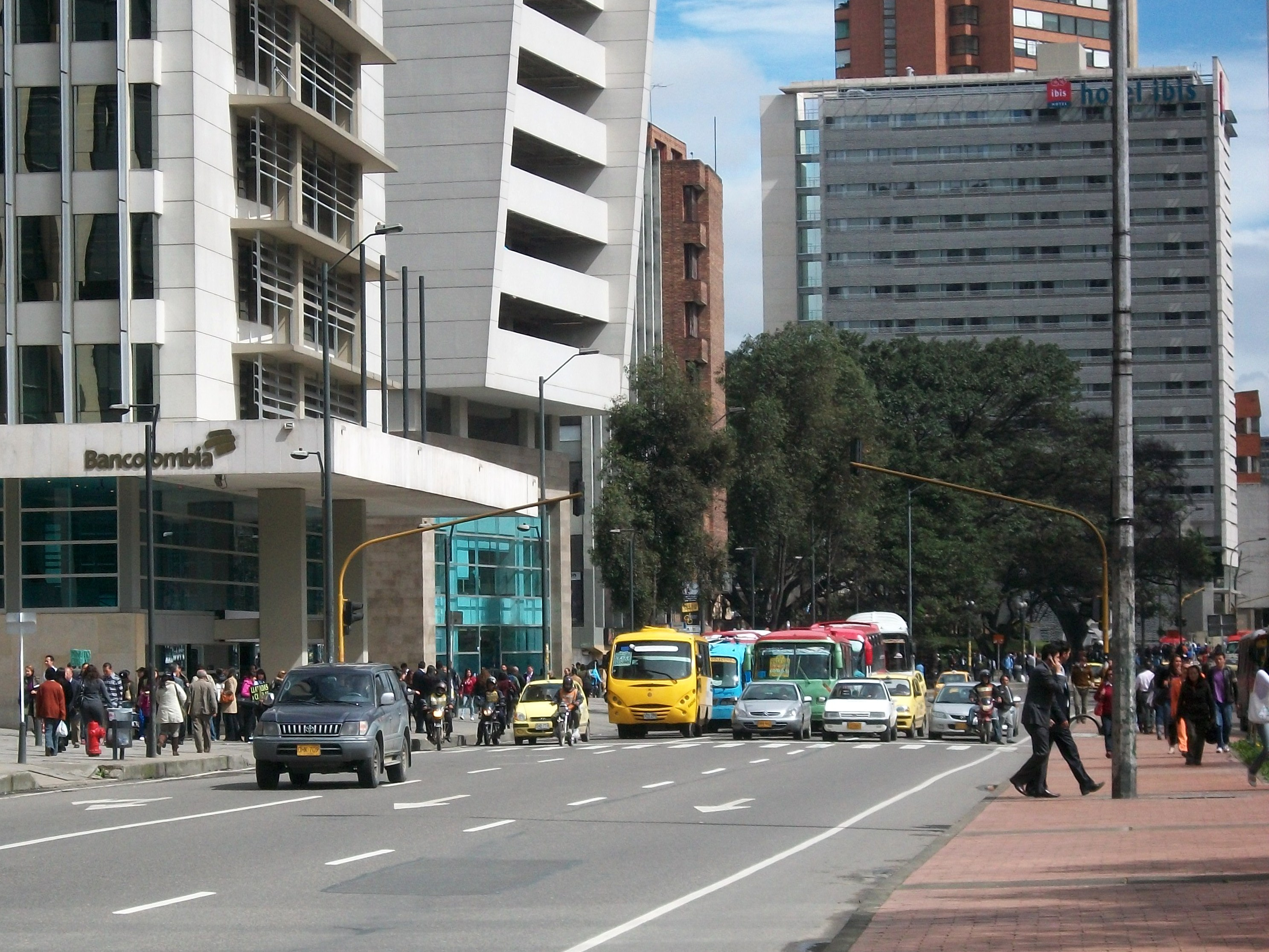 Zona bancaria de la carrera 5 con calle 47 en Bogotá. Al fondo, hotel Ibis en la calle 28.